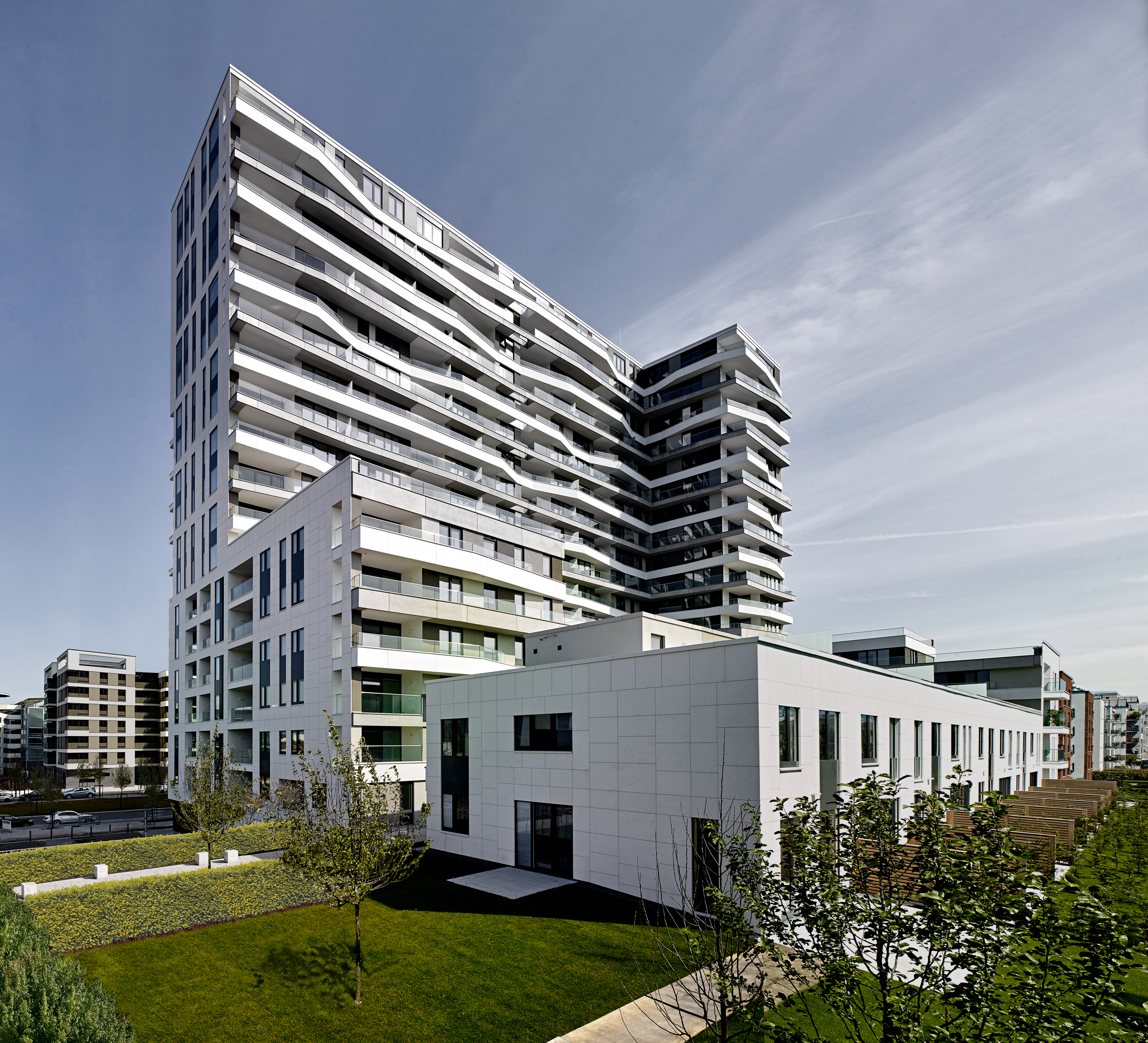 Wohnhochhaus Axis Meixner Schlüter Wendt Architekten